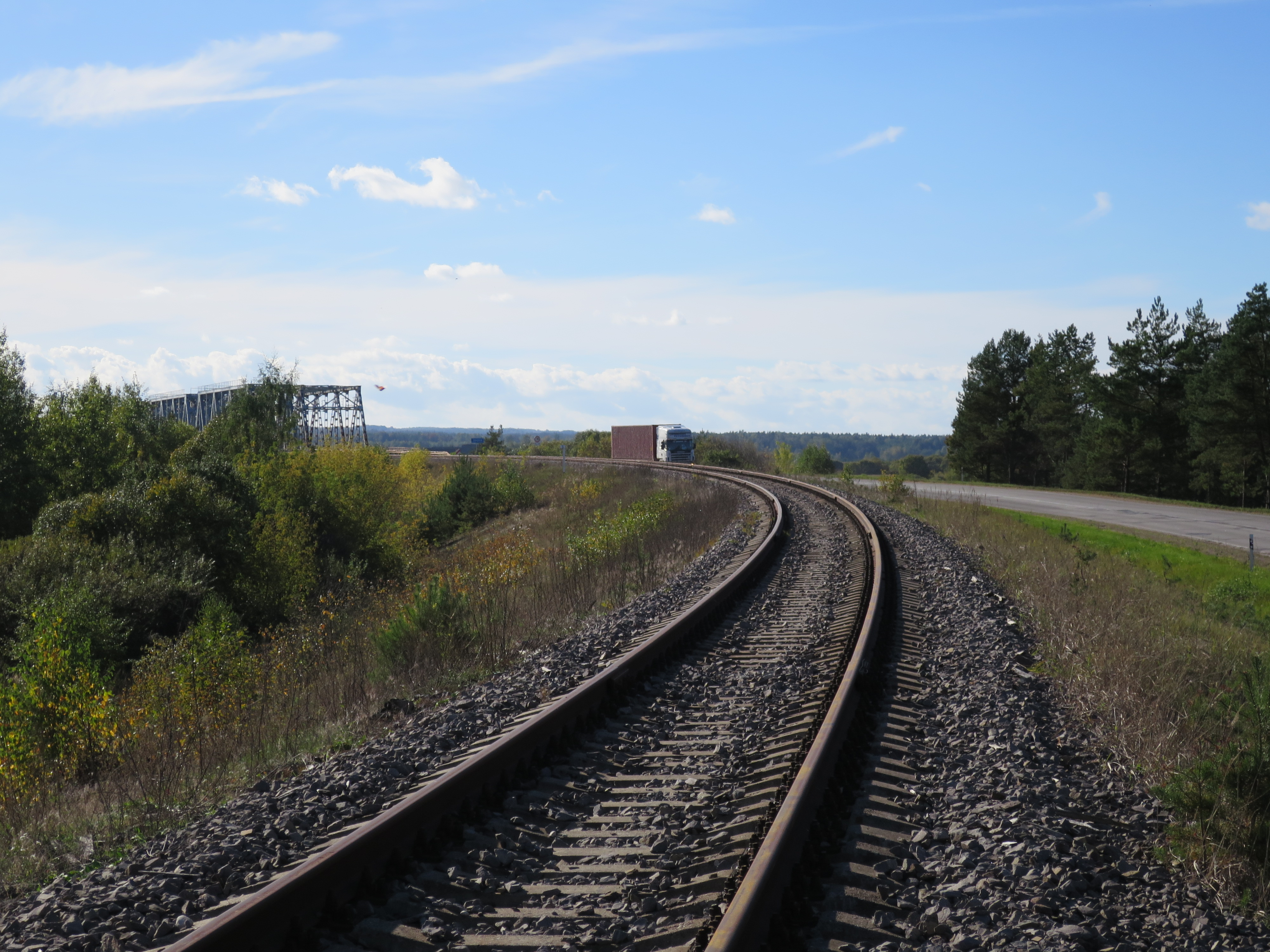 Daugavpils apvedceļa līnija